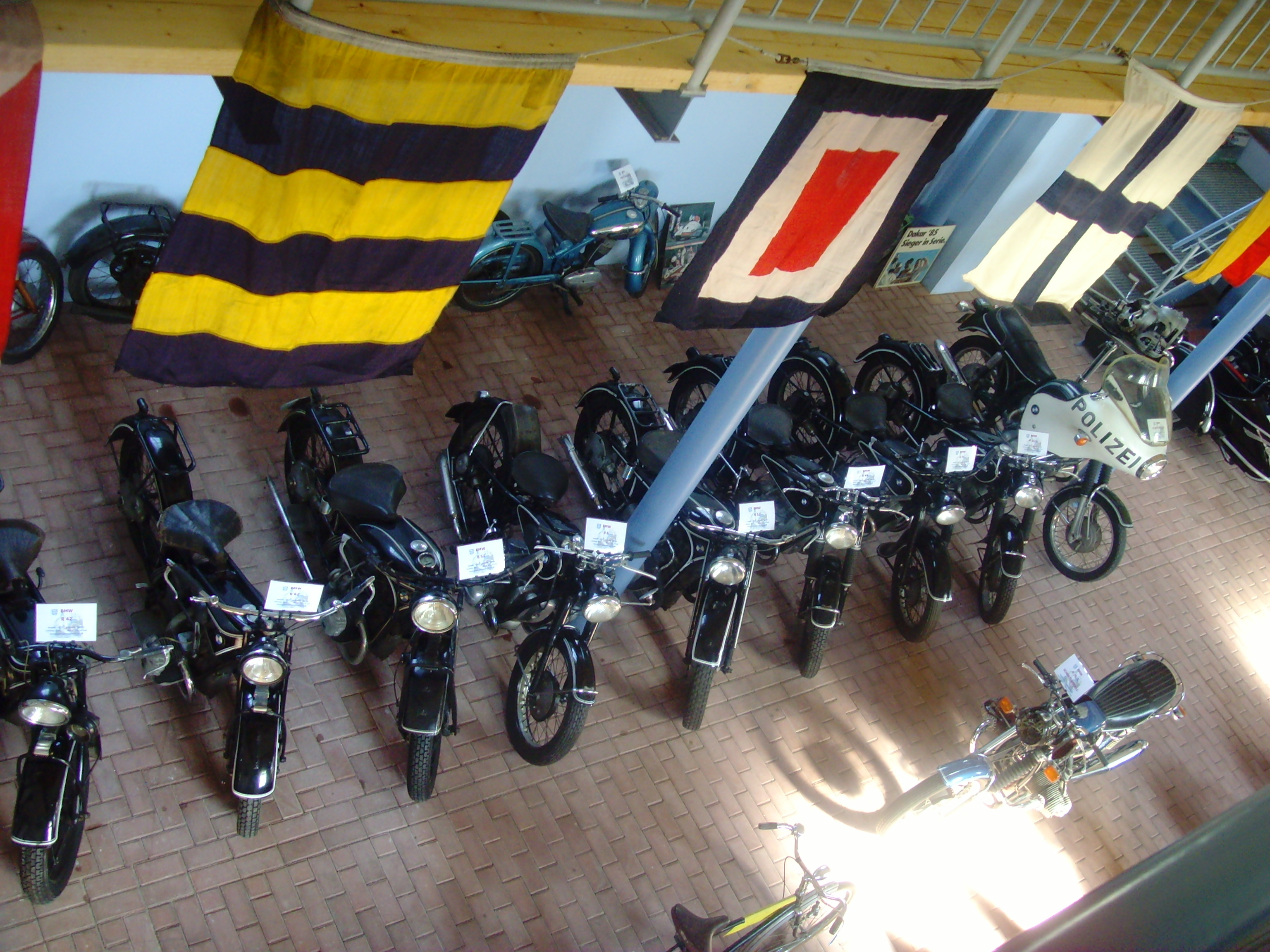 BMW